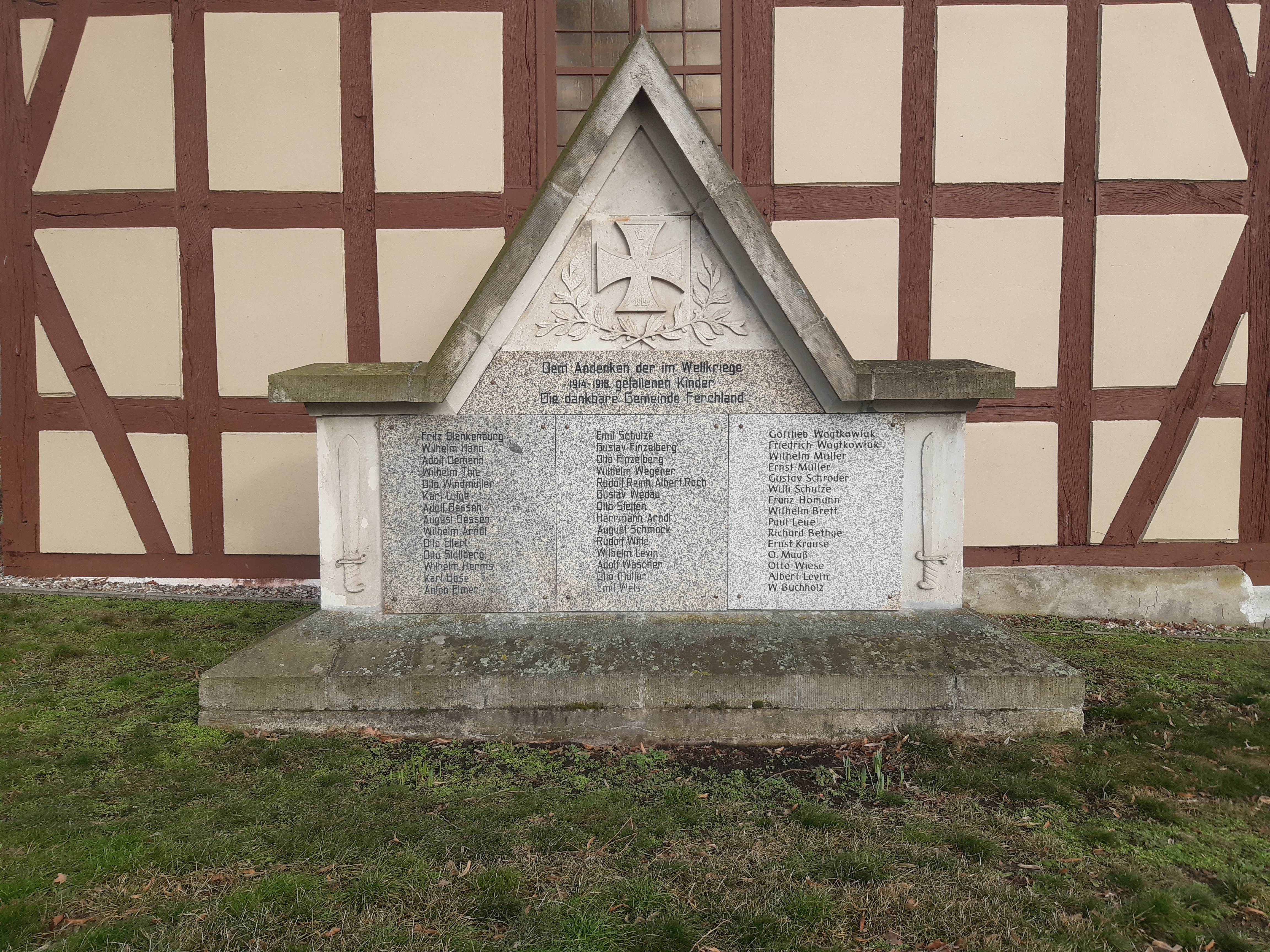 Kriegerdenkmal